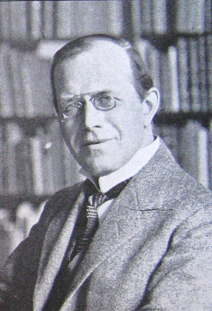 Knud Frederik Krog Fabricius (13. august 1875 i Aarhus – 30. juni 1967 i København) var en dansk historiker, professor dr. phil.